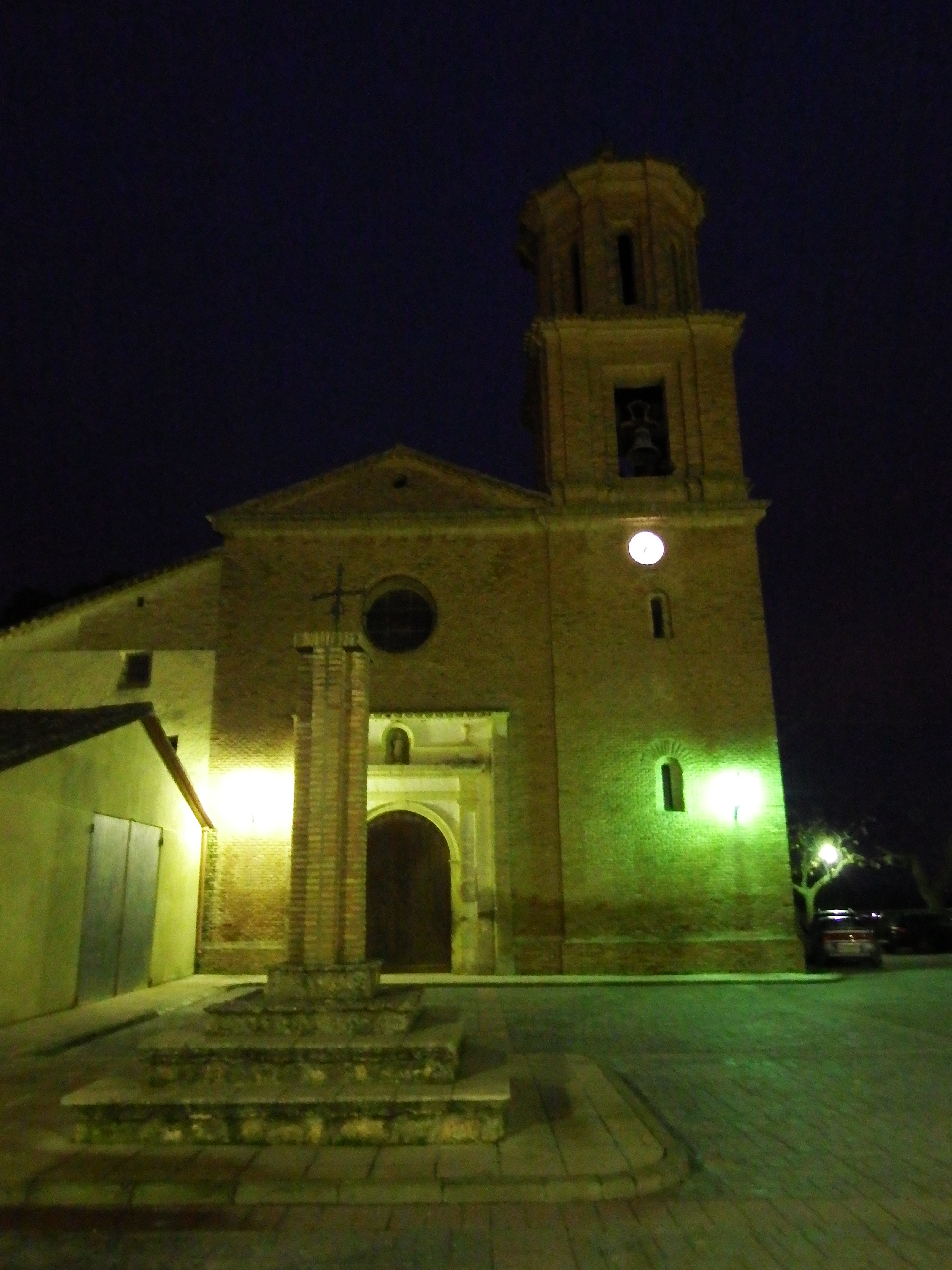 Barbuñales